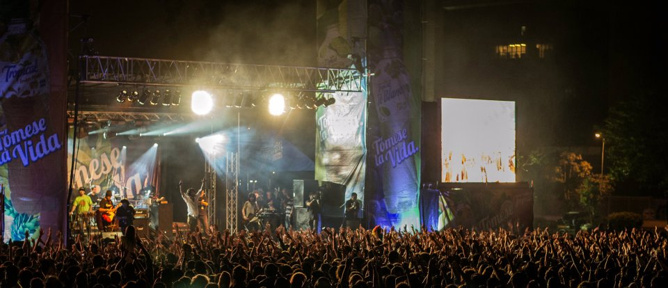 Cocofunka en la Sabana